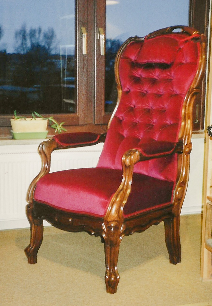 Lehnsessel mit königlich-preußischen Brandzeichen, vor 1876 gebaut